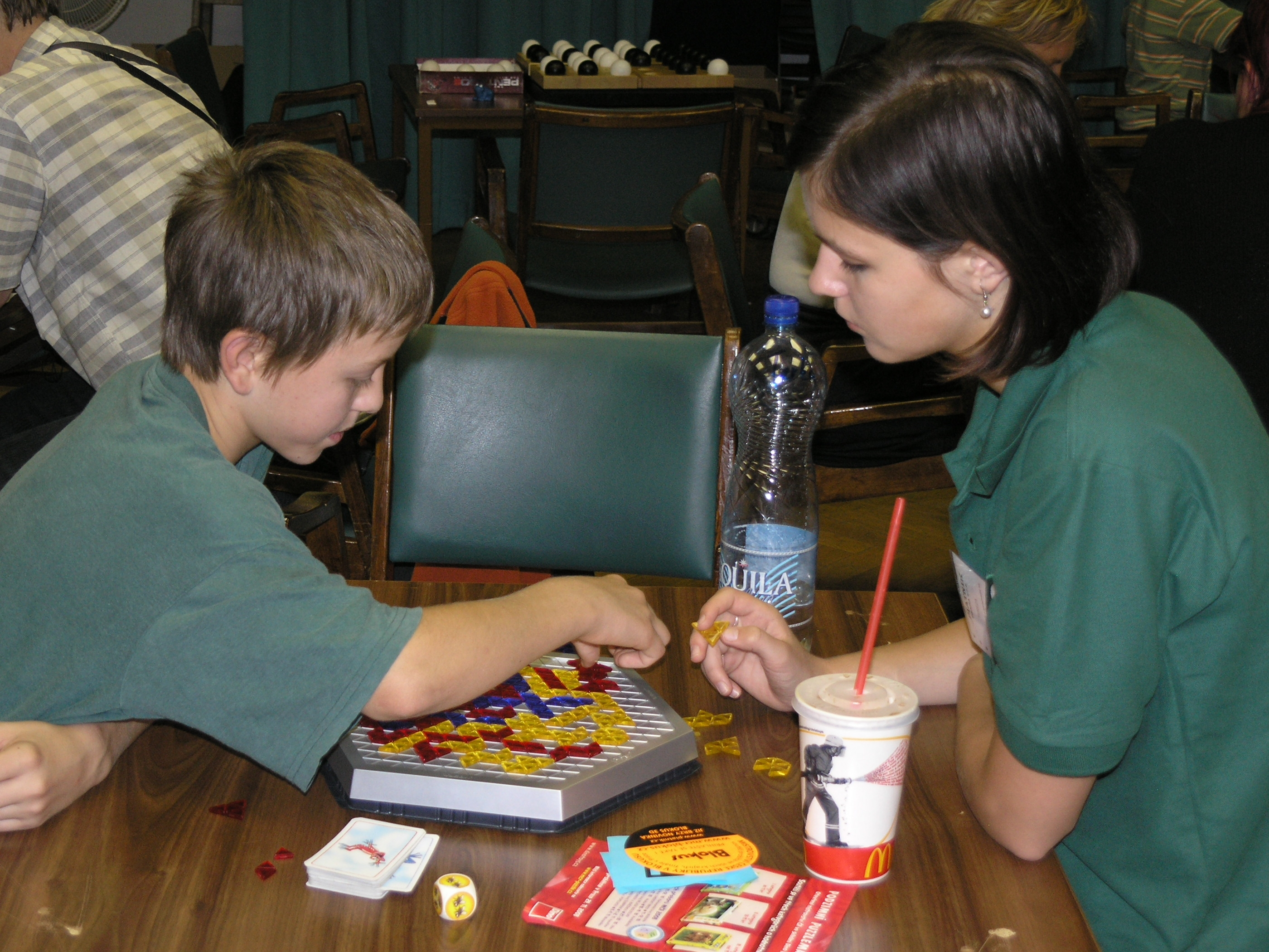 Hry a hlavolamy 2008 - festival her a hlavolamů v Praze, Holešovicích